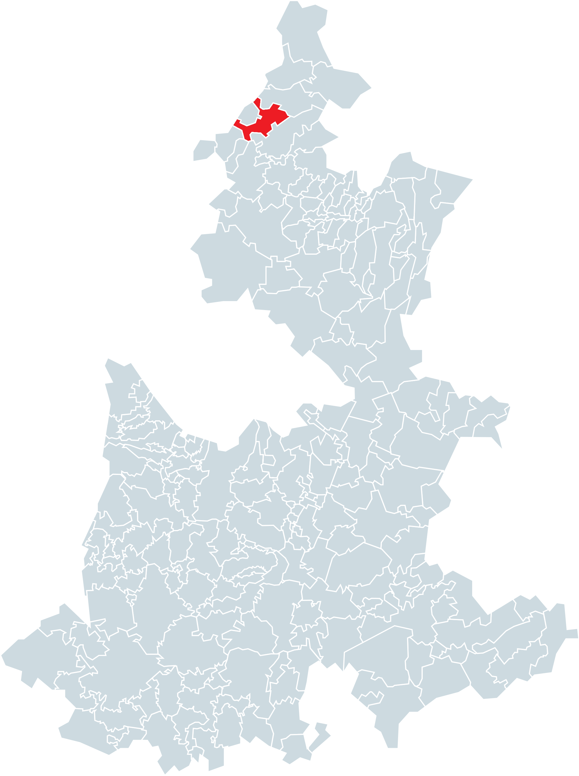 Municipio de Tlacuilotepec